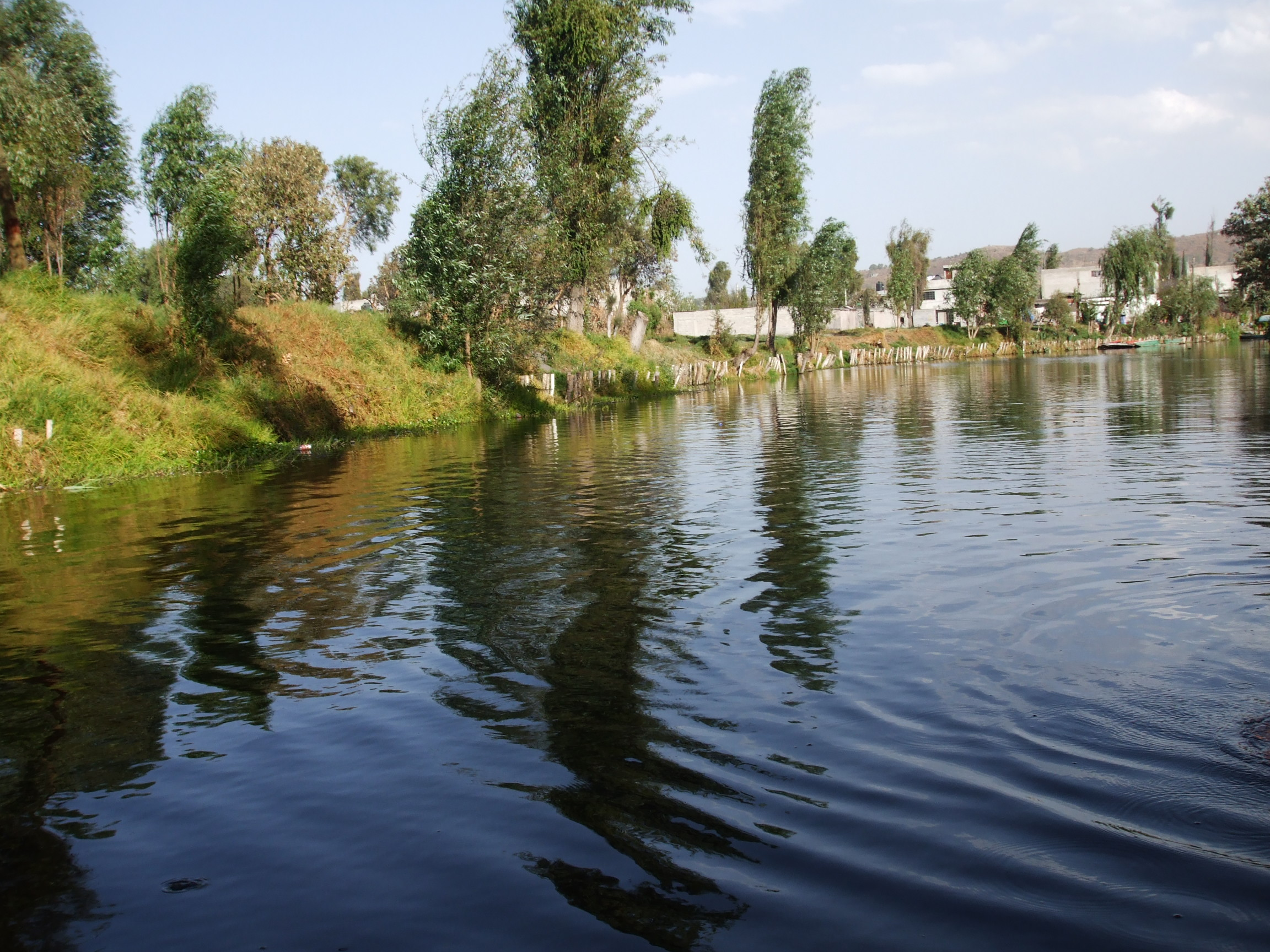 Vista de la orilla de los uno de los canales que conforman Xochimilco, de paseo hahaha Al Sur de la Ciudad de México abordo de una trajinera